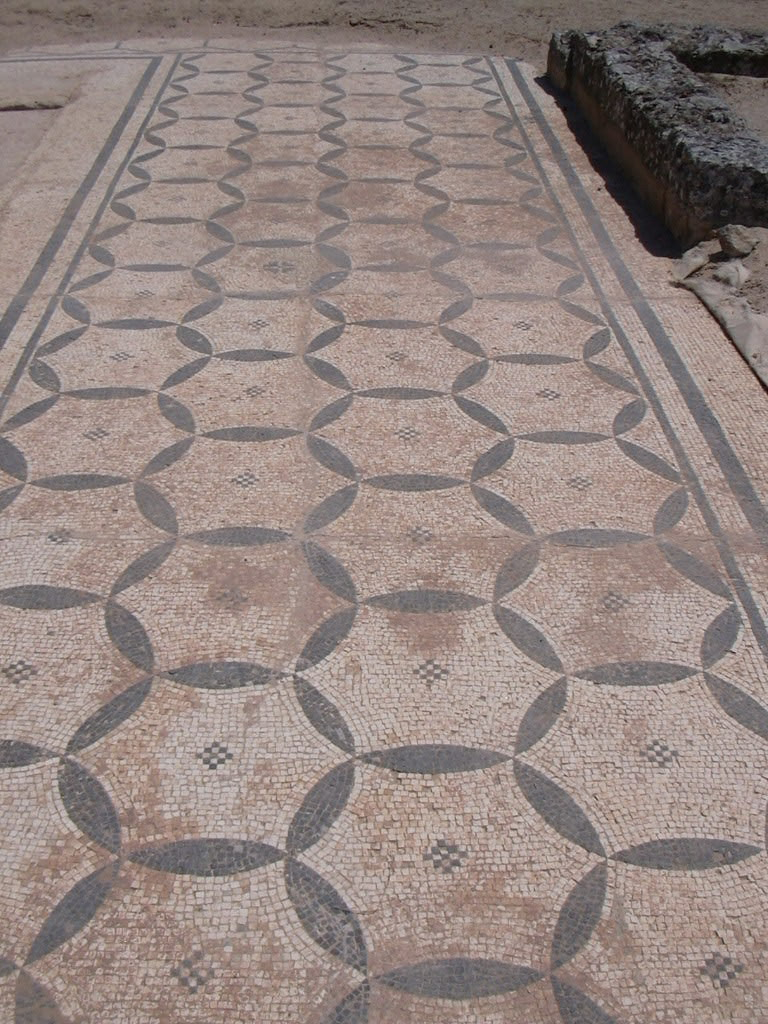 Mosaico romano de Clunia